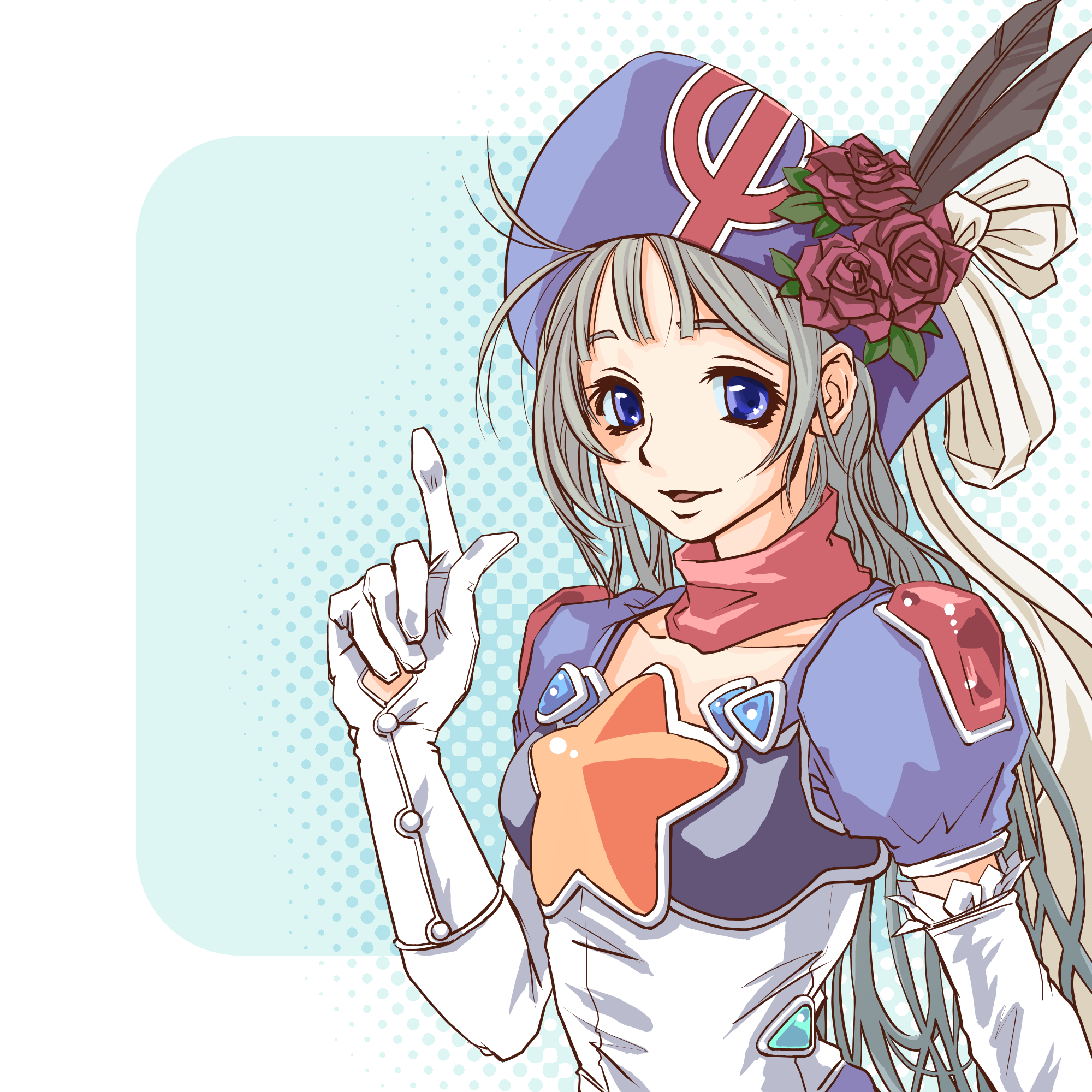 Opera-tan